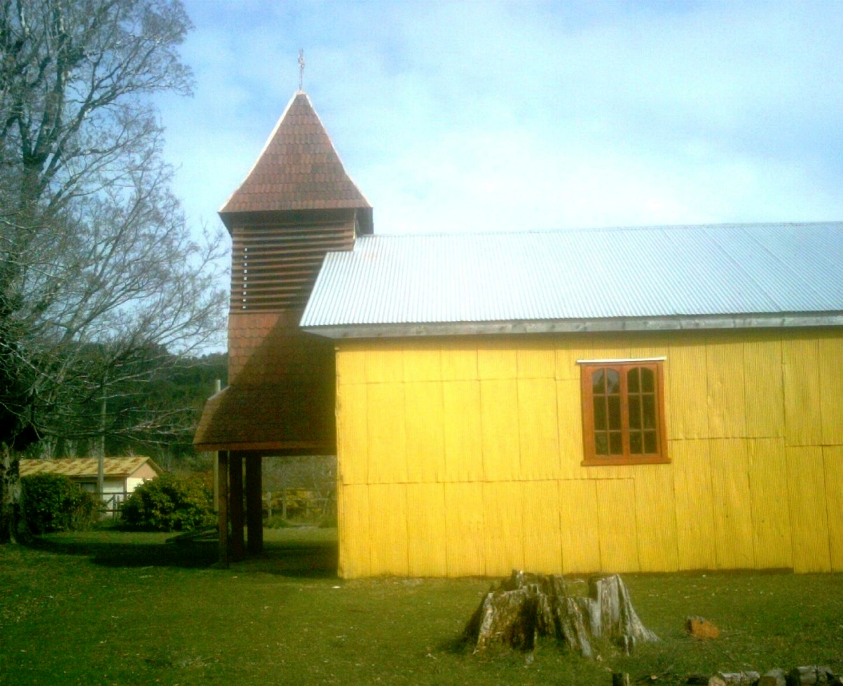 Campanario y lado de la iglesia de Punucapa, Valdivia, Chile